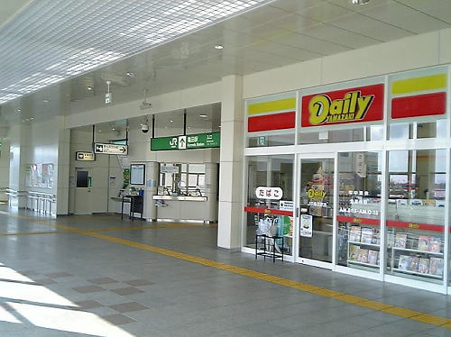 JR亀田駅改札口付近